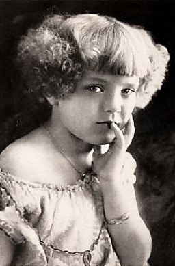 Zoe Rae